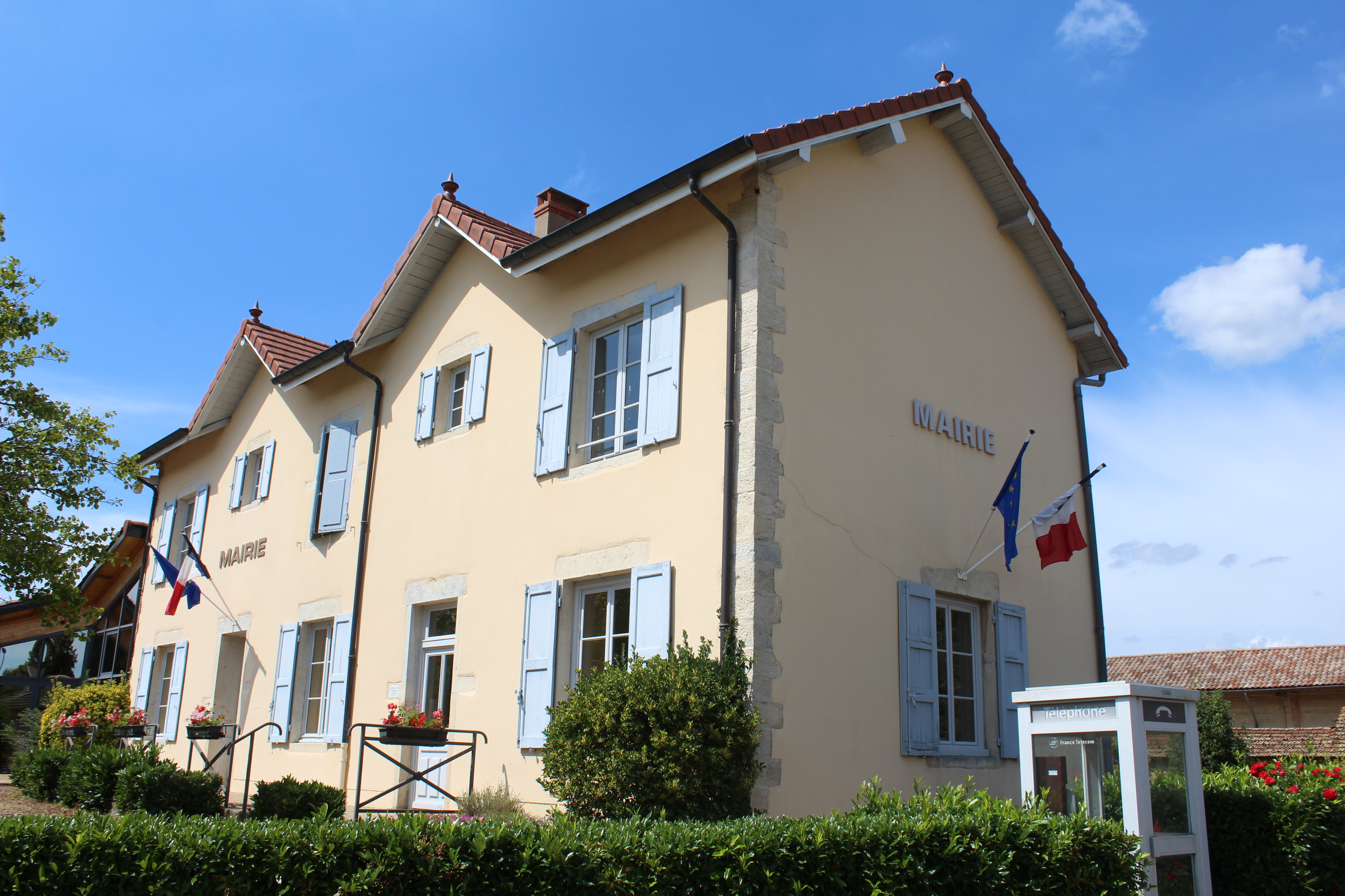 Mairie de Bey dans l'Ain.